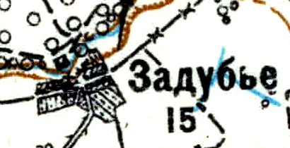 Топографическая карта Ленинградской области, квадрат Vc-29 (Батецкая), деревня Задубье